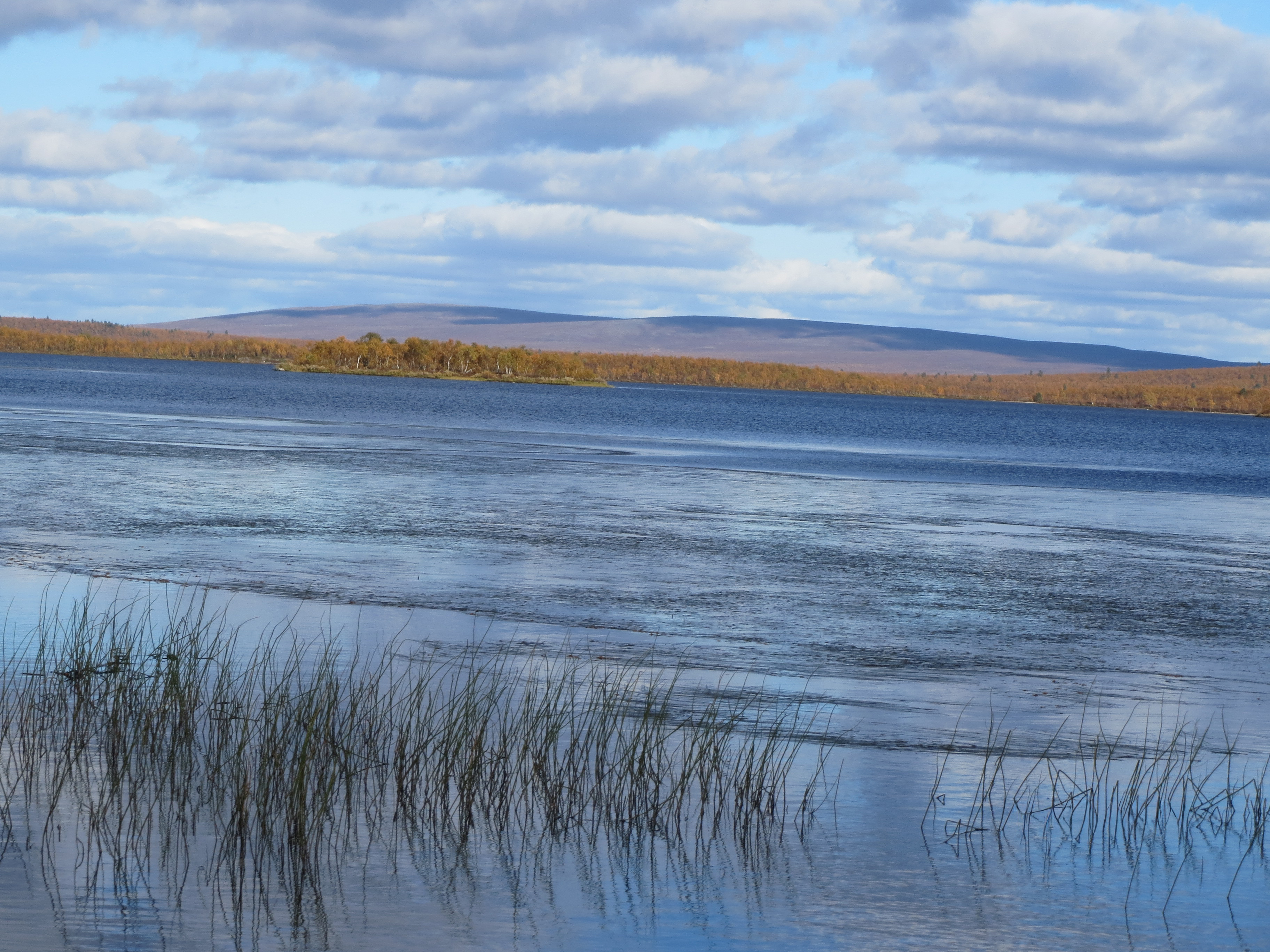 Palojärvi syksyllä